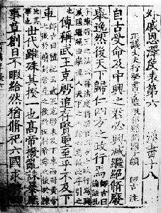 宋刻本《汉书》